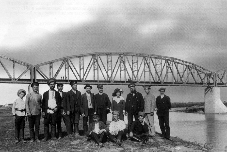 Первый железнодорожный мост через р. Тобол на Транссибирской магистрали (Ялуторовск). Мост возведён по проекту инженера Е. К. Кнорре и удостоен золотой медали на Всемирной выставке в Париже.